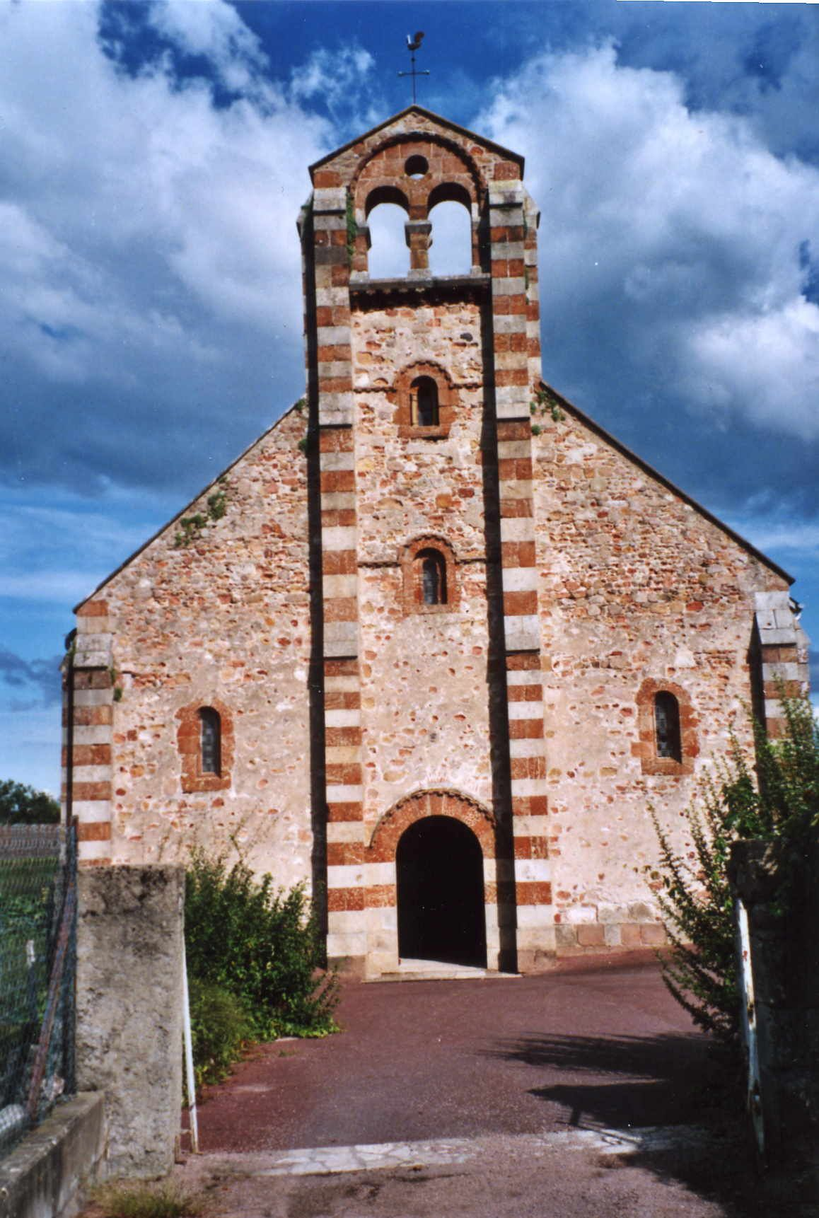 LE BREUIL